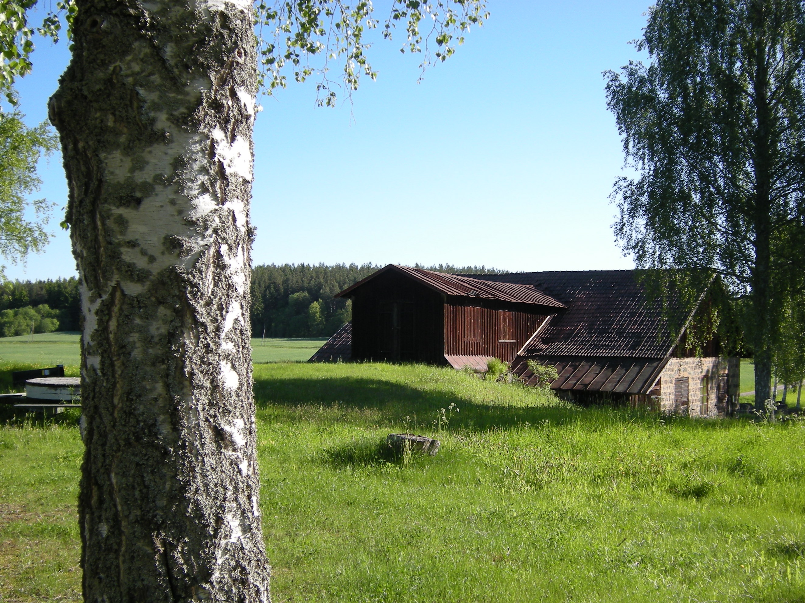 Dynamohuset, Rällingsberg. Bergslagssafari 2010